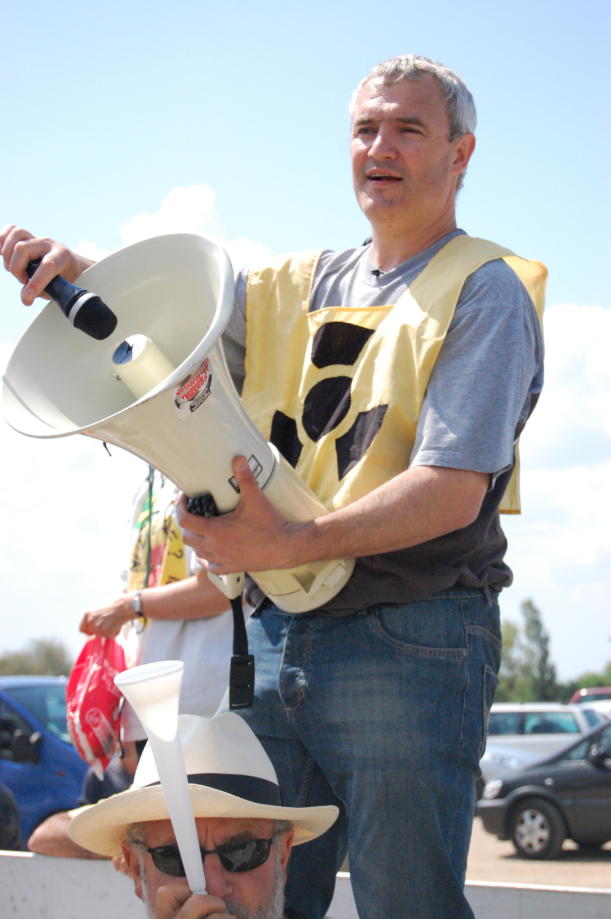 Stéphane Lhomme, membre du parti Europe Ecologie Les Verts et président de l'assocation Technoblaye lors de la manifestation du 25/04/2011 devant la centrale nucléaire du Blayais